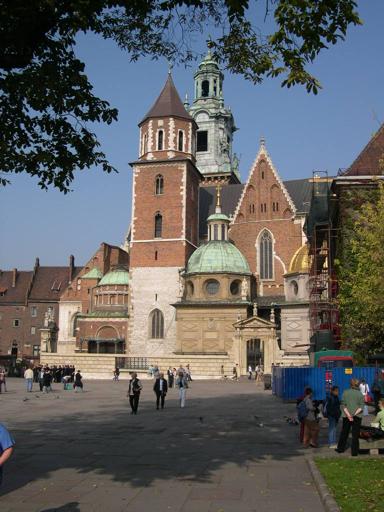 Kathedraal Wawel in Kraków, Fotograaf: Jan Nijman oktober 2004